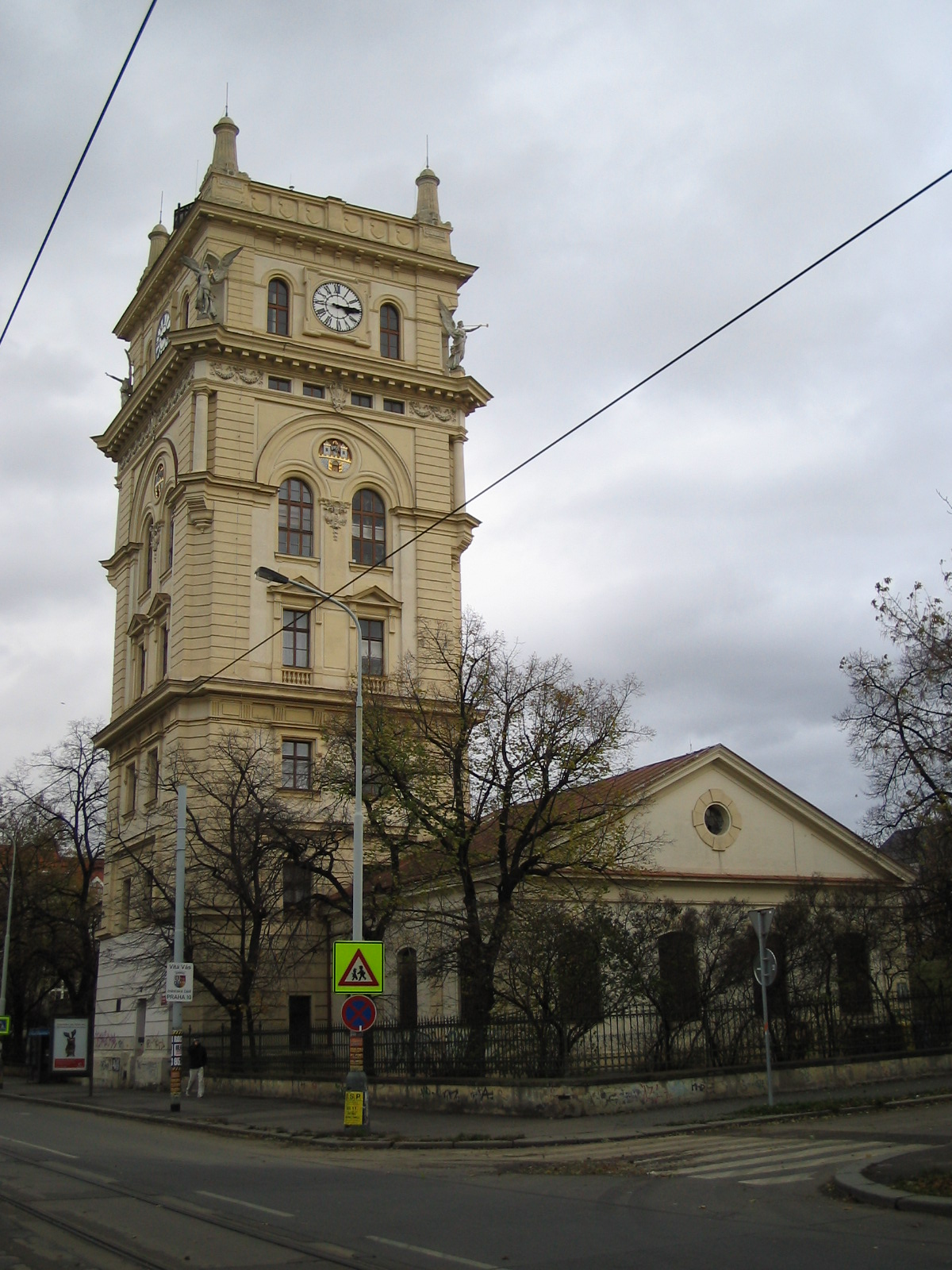 Vinohradská vodárenská věž v Praze 10. Vlastní foto.